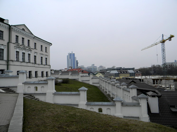 Мінск. Дом масонаў